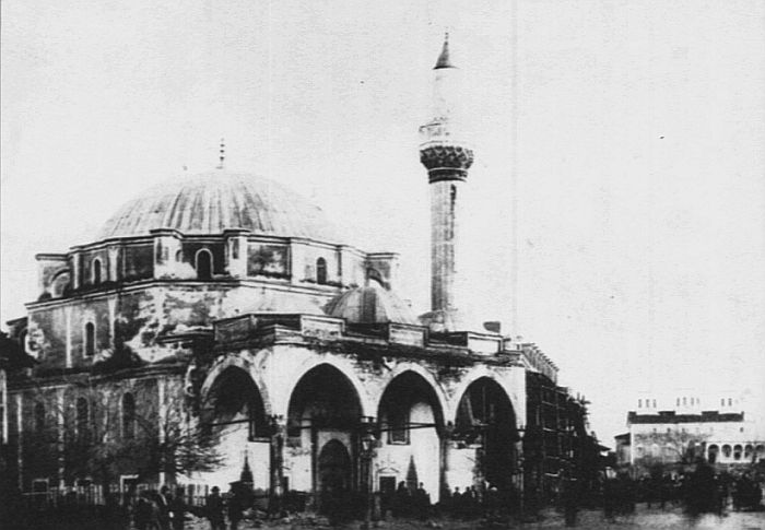 Баня баши джамия от края на 19 век